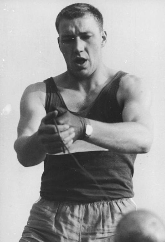 Martin Lotz XIII. Deutsche Leichtathletik-Meisterschaften 1962. Vom 28. bis 30.09.1962 wurden im Dresdner Heinz-Steyer-Stadion die XIII. Deutsche Leichtathletik-Meisterschaften 1962 ausgetragen. UBz: Deutscher Meister im Hammerwerfen wurde Lotz (SC DHfK Leipzig) mit 63,96 m.